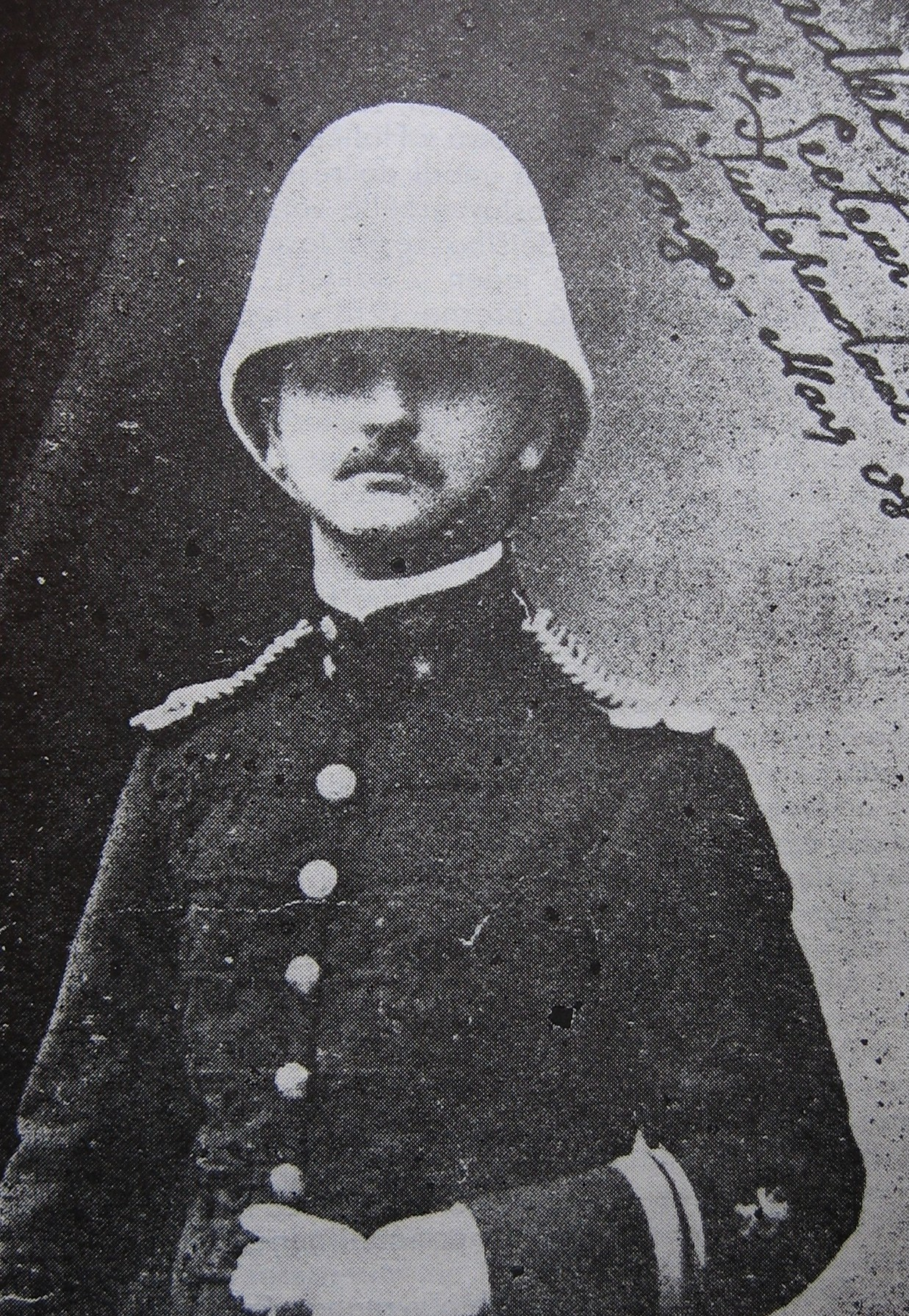 Kapitán Eduard Kadlec v uniformě belgického důstojníka (1908)